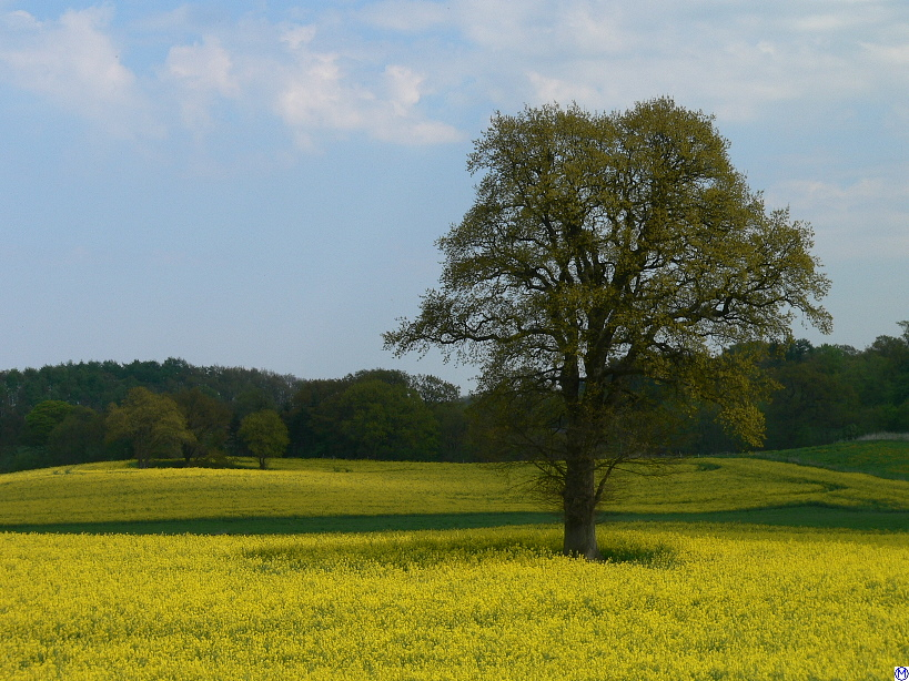 Blühendes Rapsfeld in Holstein 14.5.2005 (Kreis Plön)